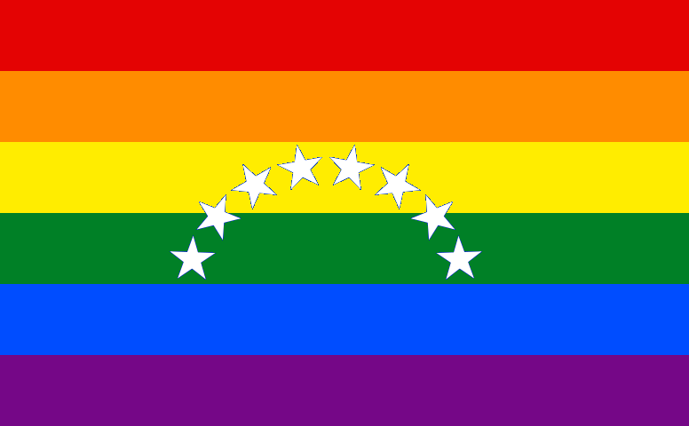 Bandera de Venezuela con los seis colores de la bandera LGBT.